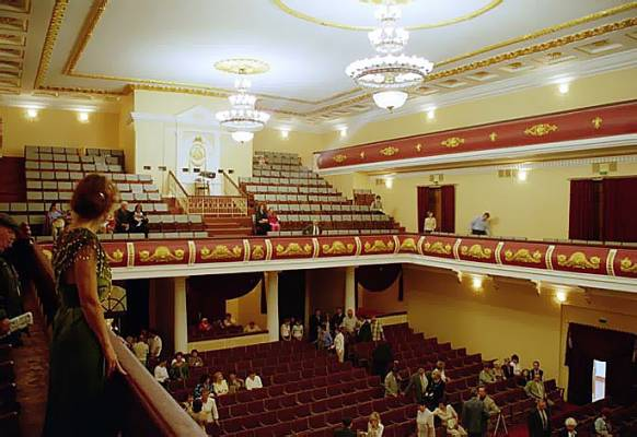 Дворец культуры (Народный дом, рабочий клуб фабрики им. Ногина, Городской культурный центр), 1915-1925, арх. П. Малиновский, В. Веснин, Н. Лазарев